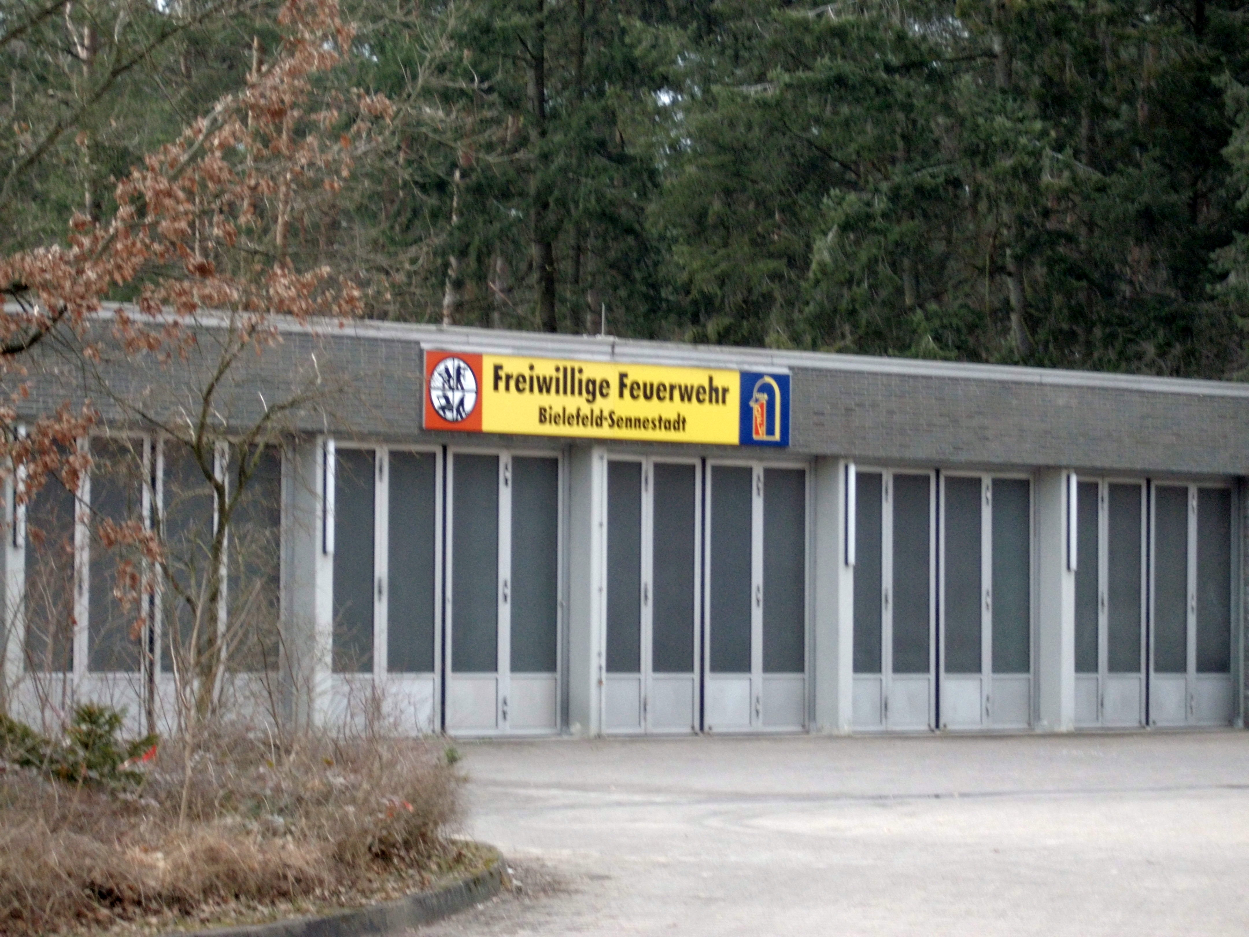 Rettungswache der Freiwilligen Feuerwehr in Sennestadt (Bielefeld)